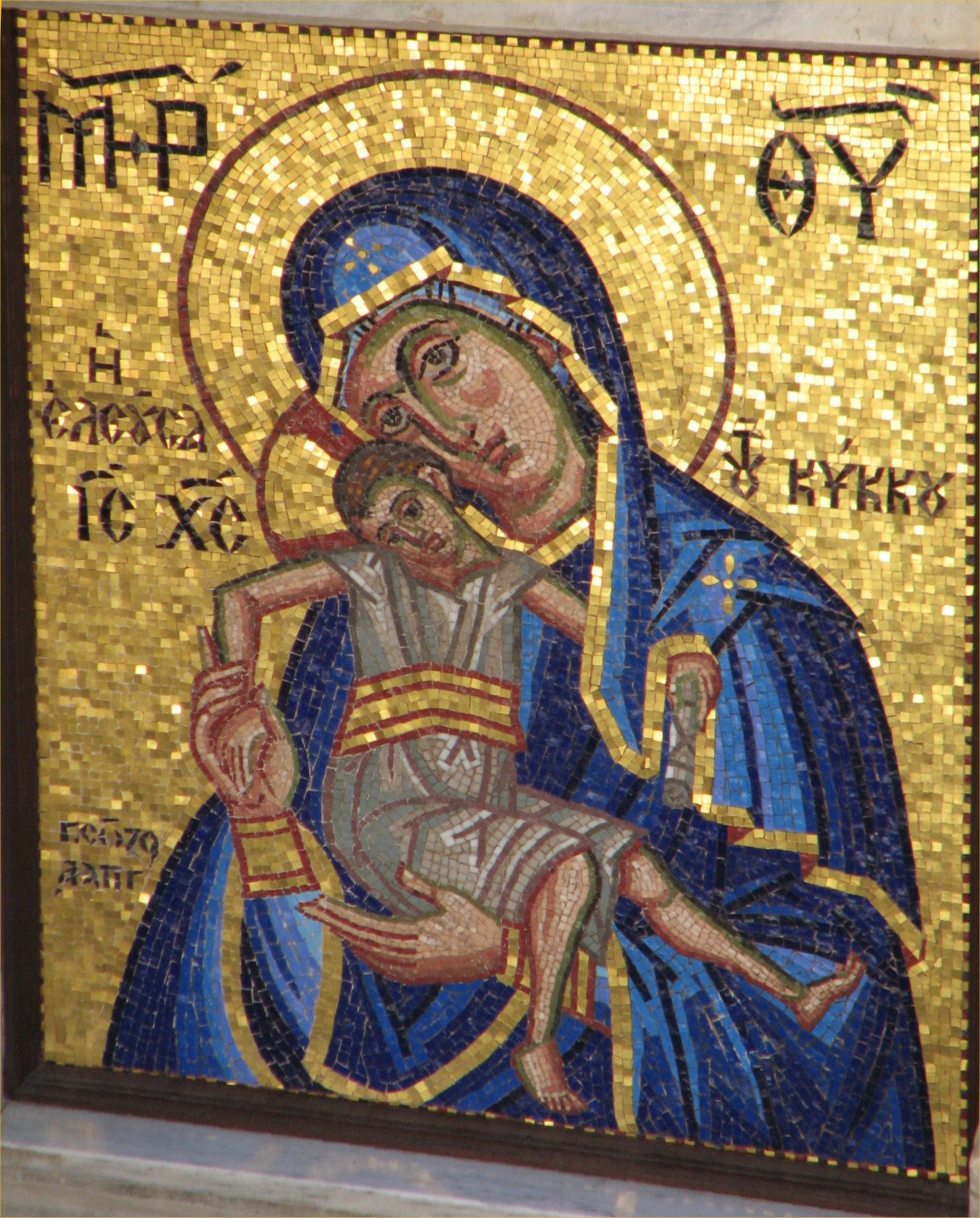 Troodos